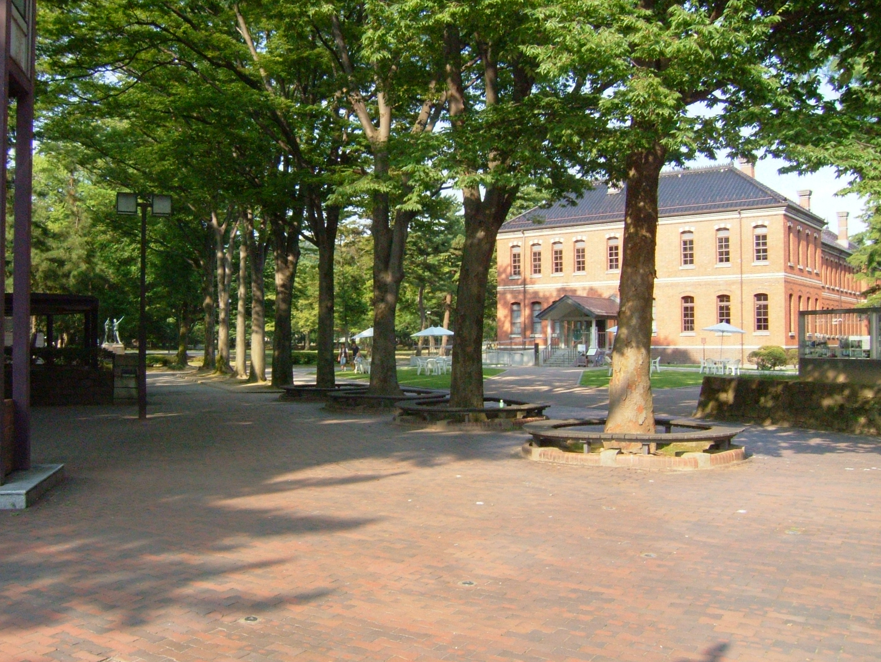 石川県金沢市広坂にある石川県中央公園。写真右奥は石川近代文学館。